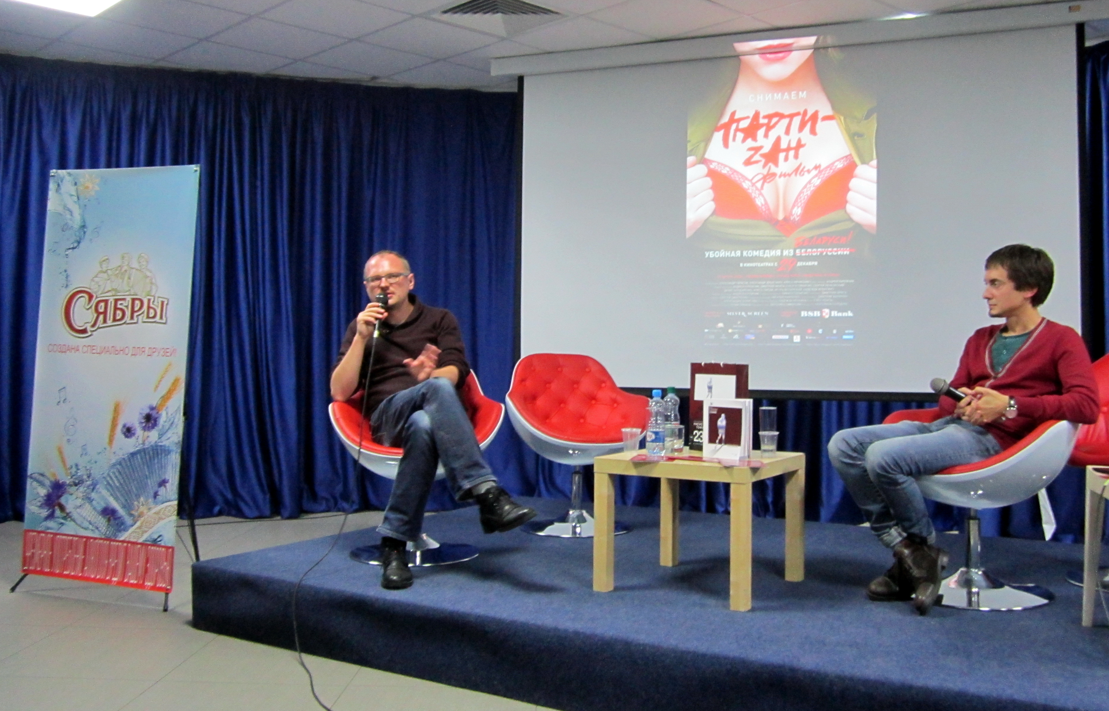 Андрей Курейчик и Дмитрий Фрига с презентацией своего фильма «PARTY-zan фильм» на XXIII Минском международным кинофестивале «Minsk International Film Festival Listapad» (2016)